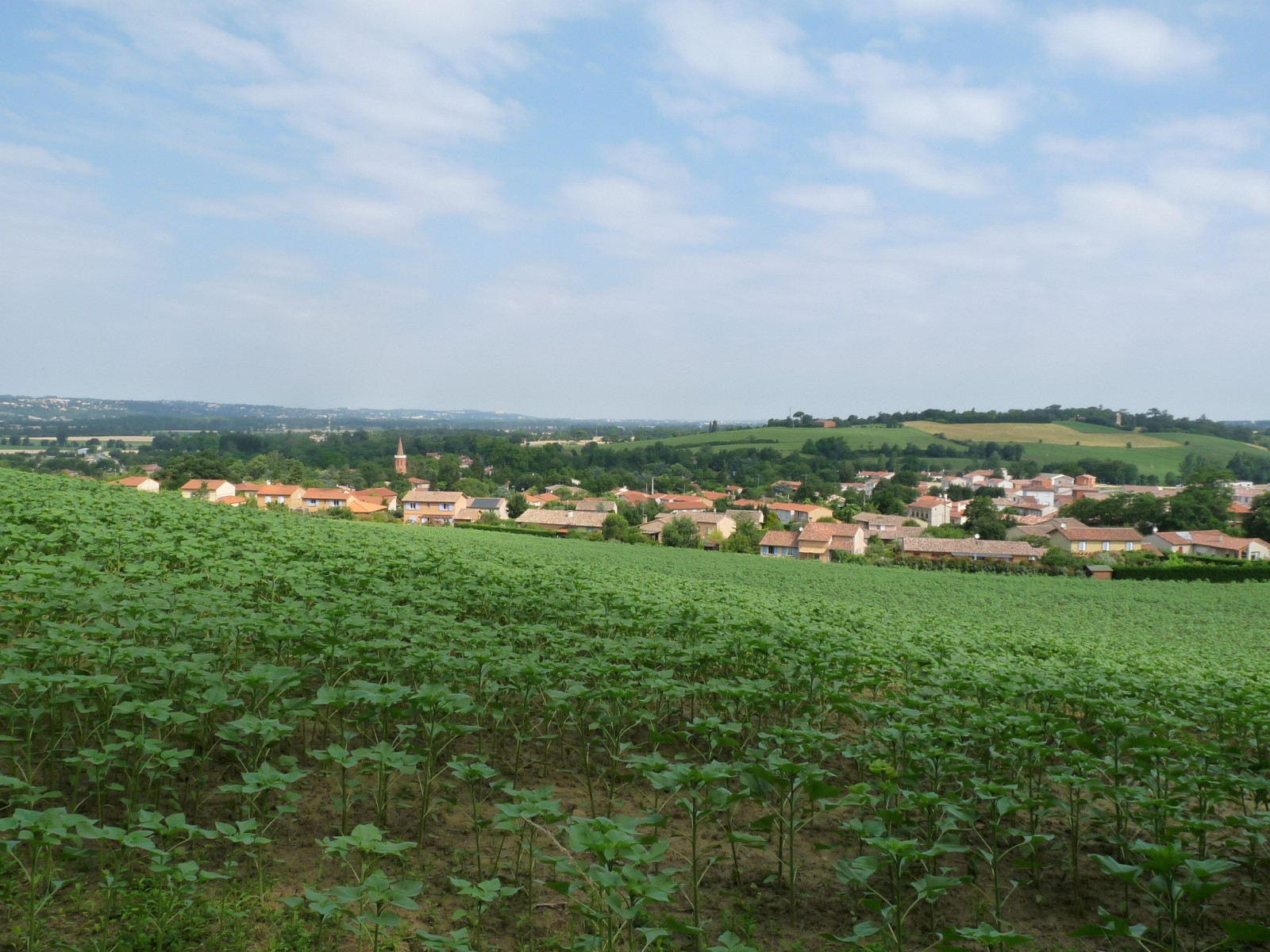 Vue vers l'ouest, Montlaur, Haute-Garonne, France